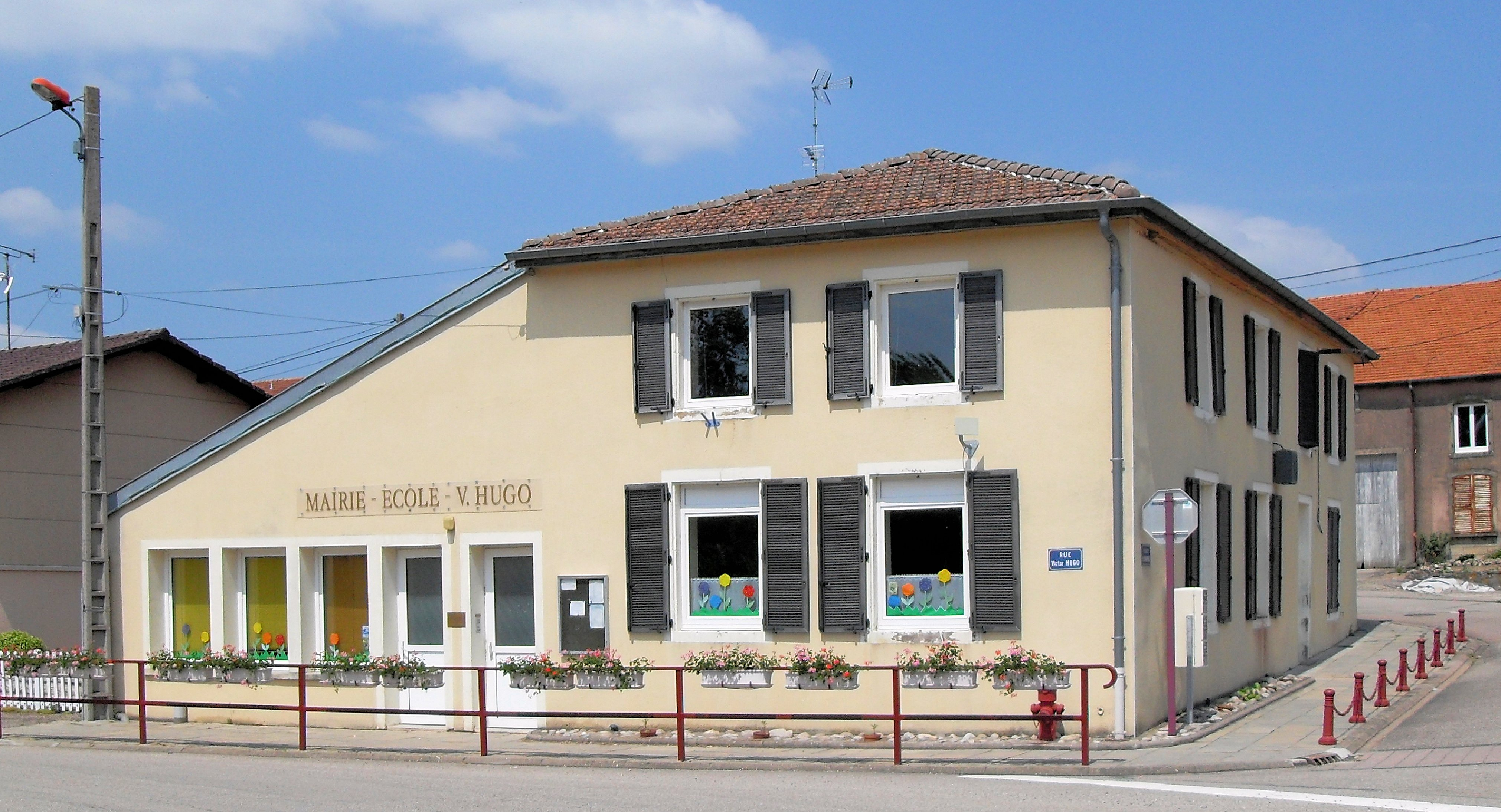 La mairie-école de Baudricourt